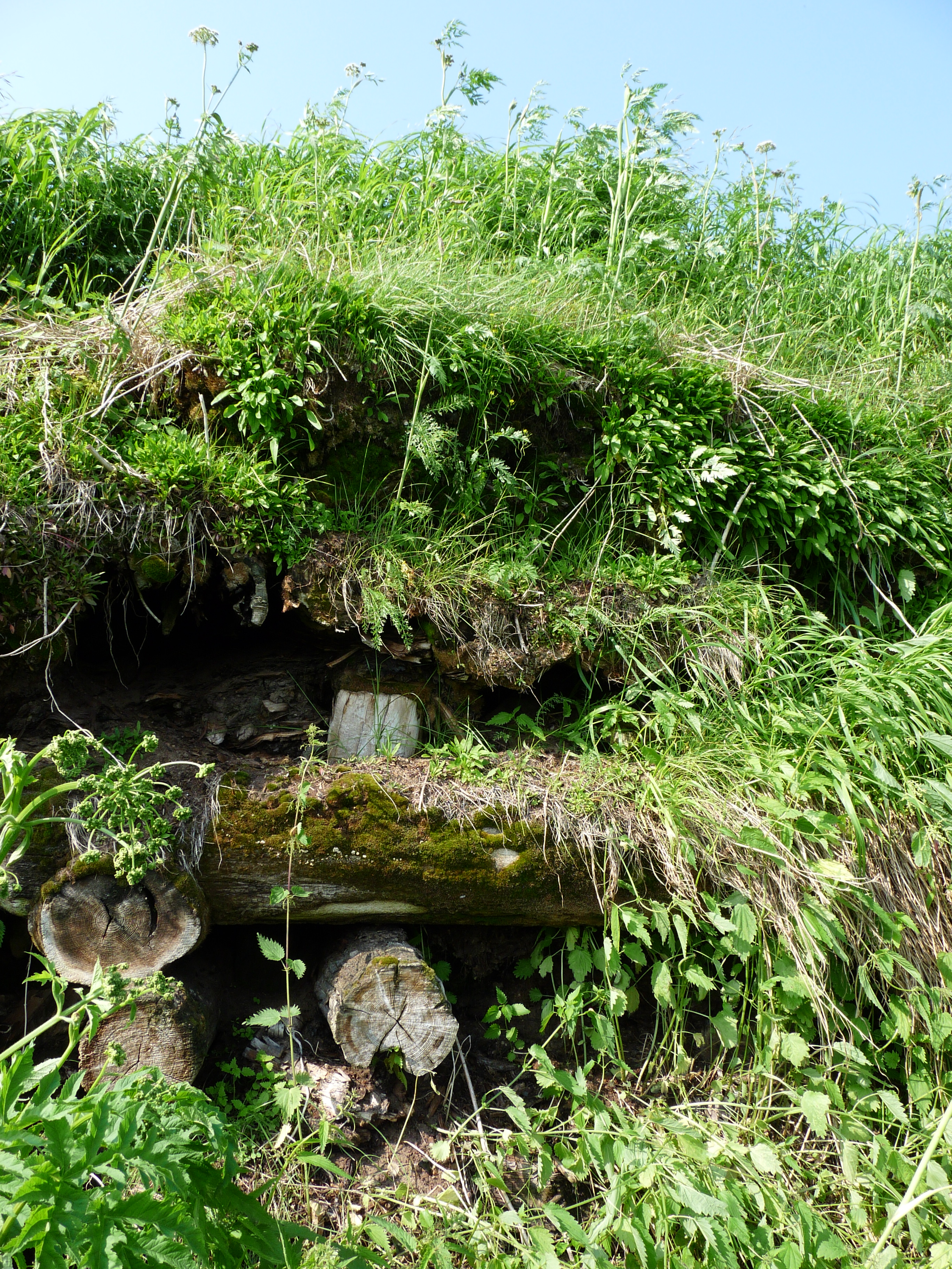 Фотография старого археологического раскопа на месте Пустозерска.